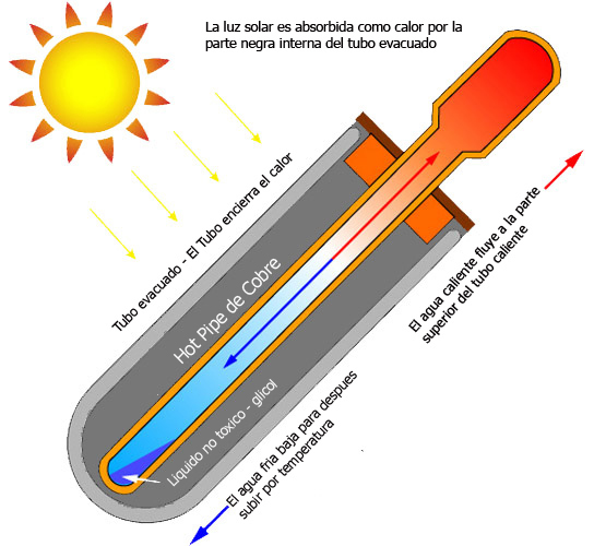 Como funciona el heat pipe